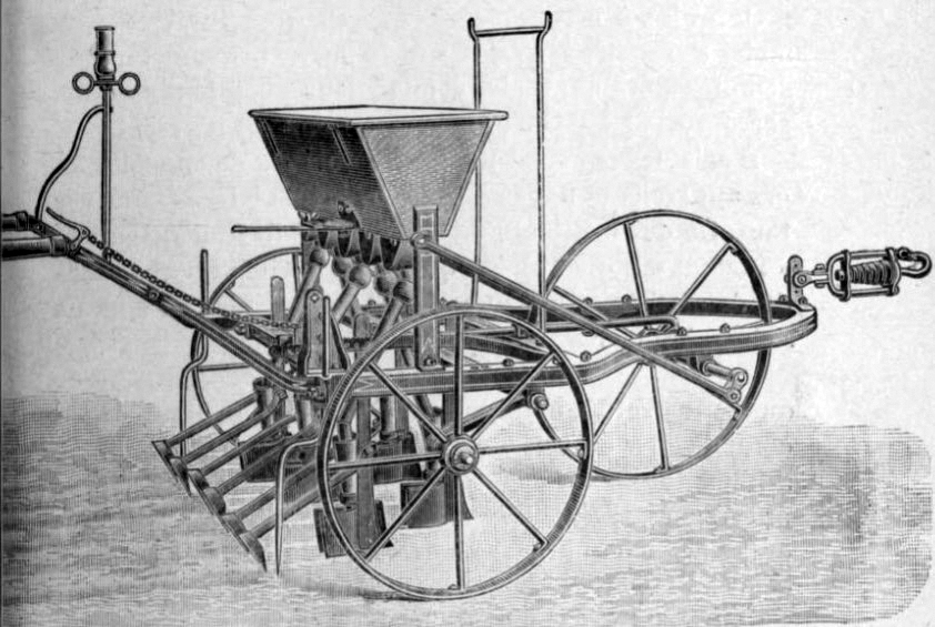 Semoir en lignes « le Pratique » de MM. Huard (société Huard Frères Châteaubriant)